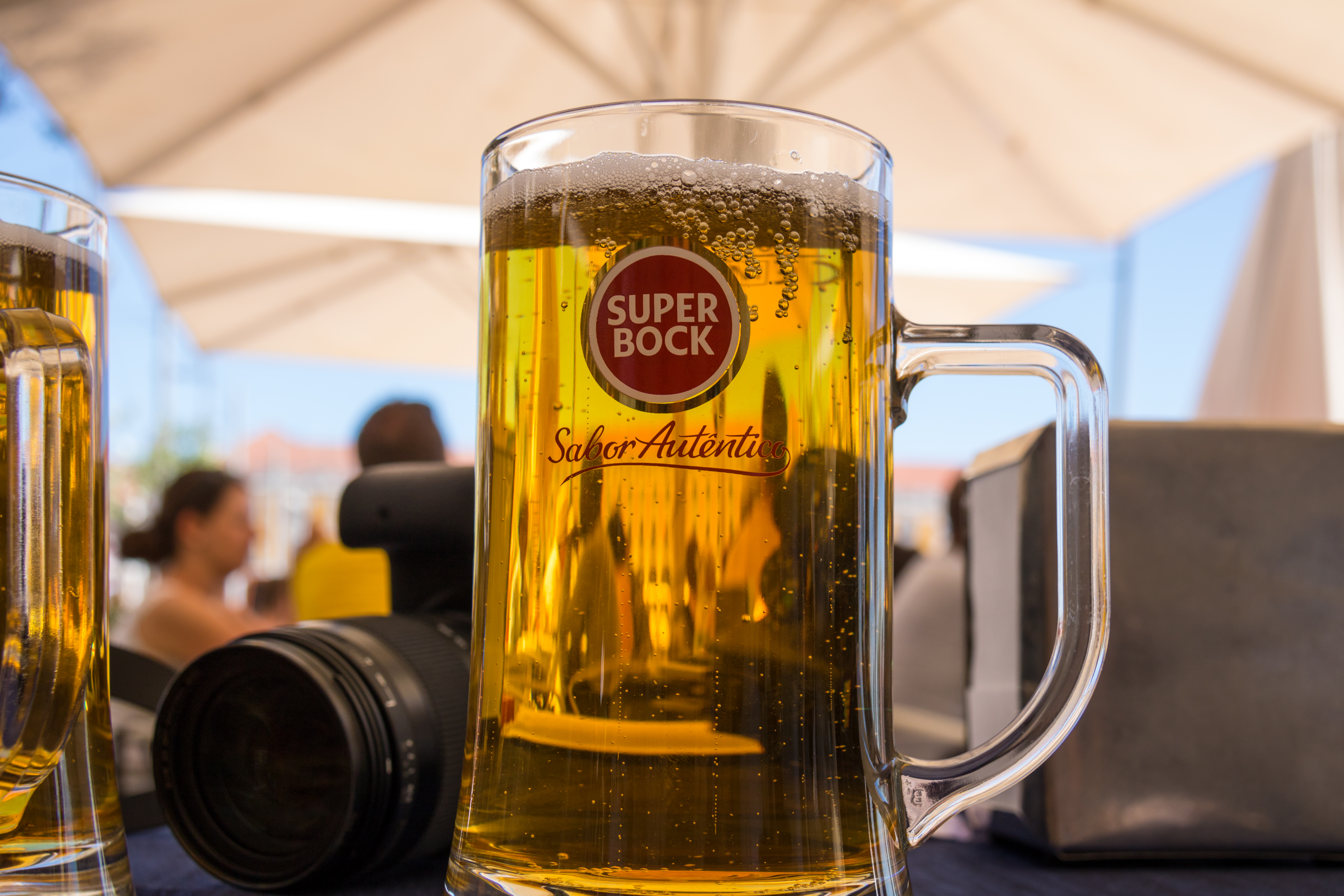 Liquid break